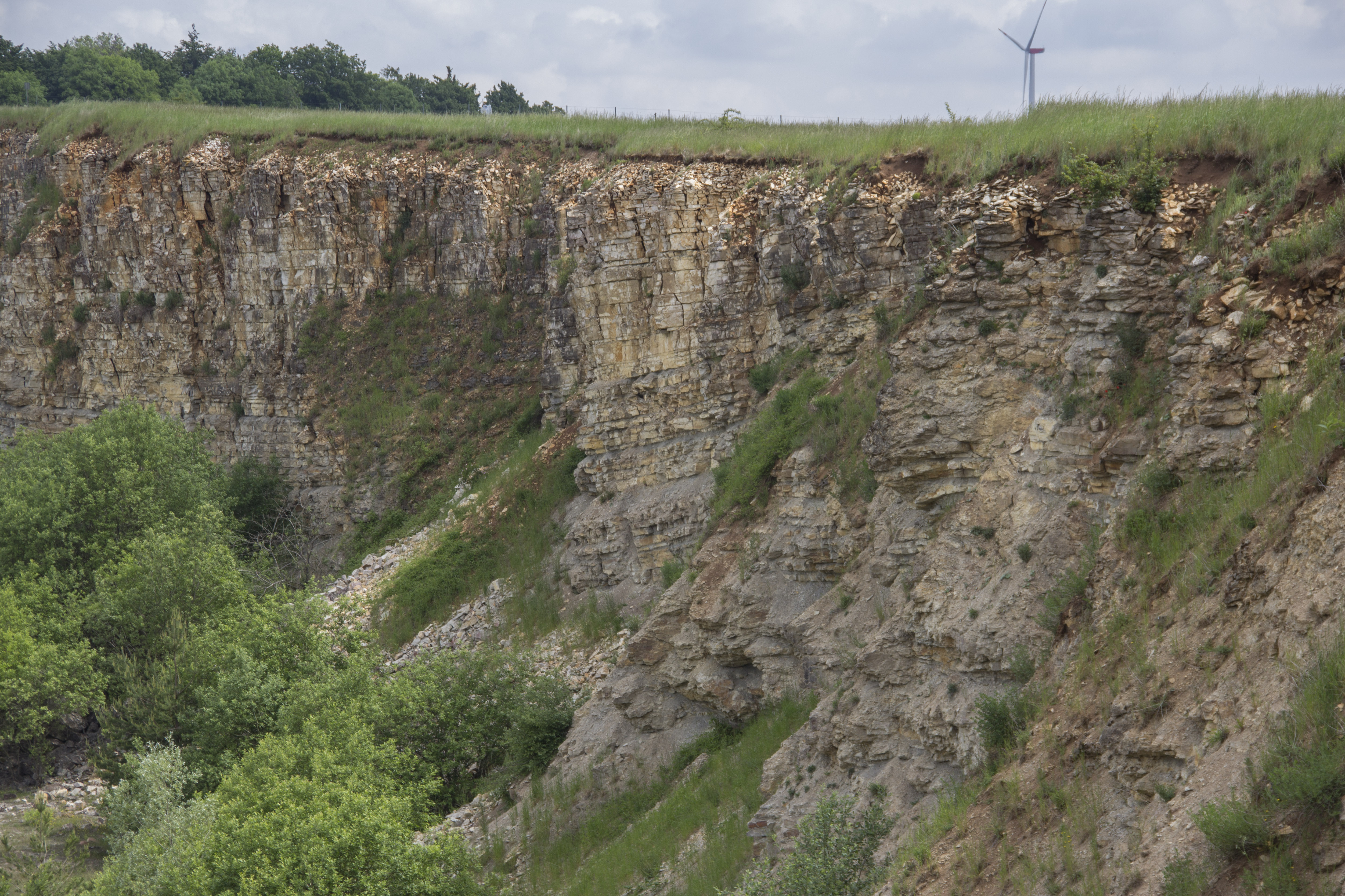 Ehemaliger Steinbruch nordöstlich von Sengenthal, Geotop, FFH Schutzgebiet